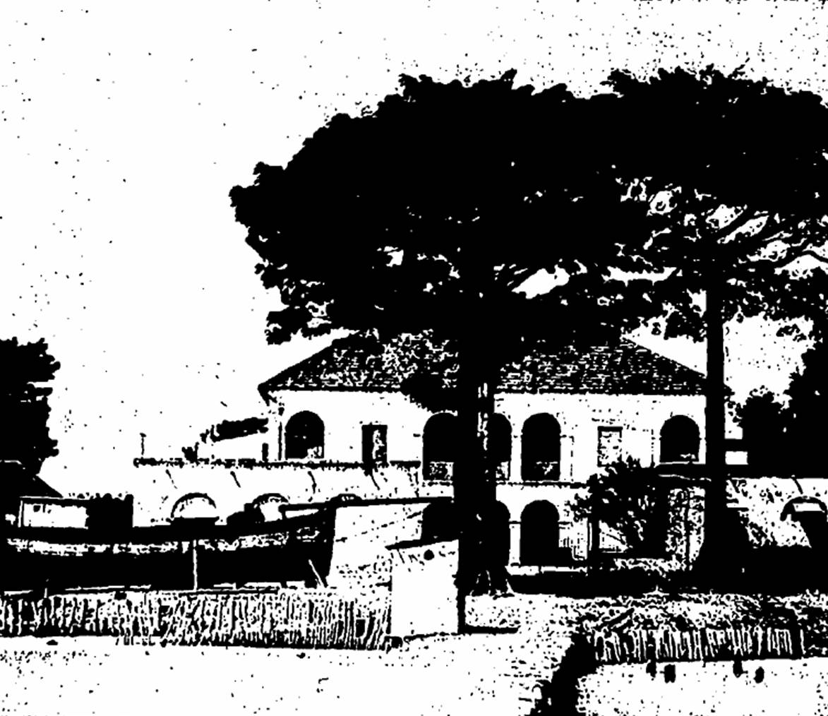 Factorerie n° 1 de la Compagnie de la Casamance à Carabane (Casamance, Sénégal)